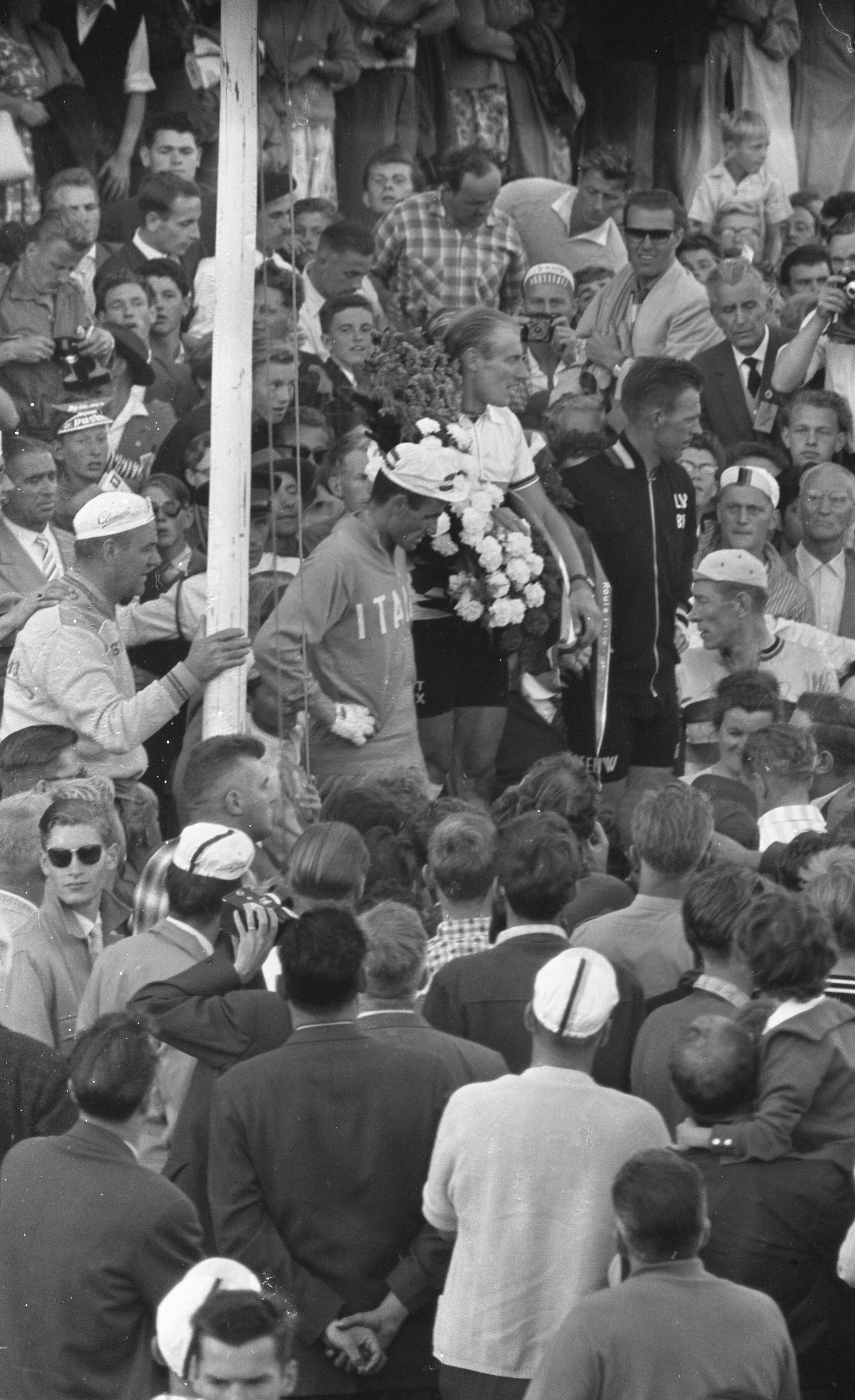 Collectie / Archief : Fotocollectie Anefo Reportage / Serie : [ onbekend ] Beschrijving : Wereldkampioenschappen wielrennen profs op de weg te Zandvoort Datum : 16 augustus 1959 Fotograaf : Rossem, Wim van / Anefo Auteursrechthebbende : Nationaal Archief Materiaalsoort : Negatief (zwart/wit) Nummer archiefinventaris : bekijk toegang 2.24.01.05 Bestanddeelnummer : 910-6022